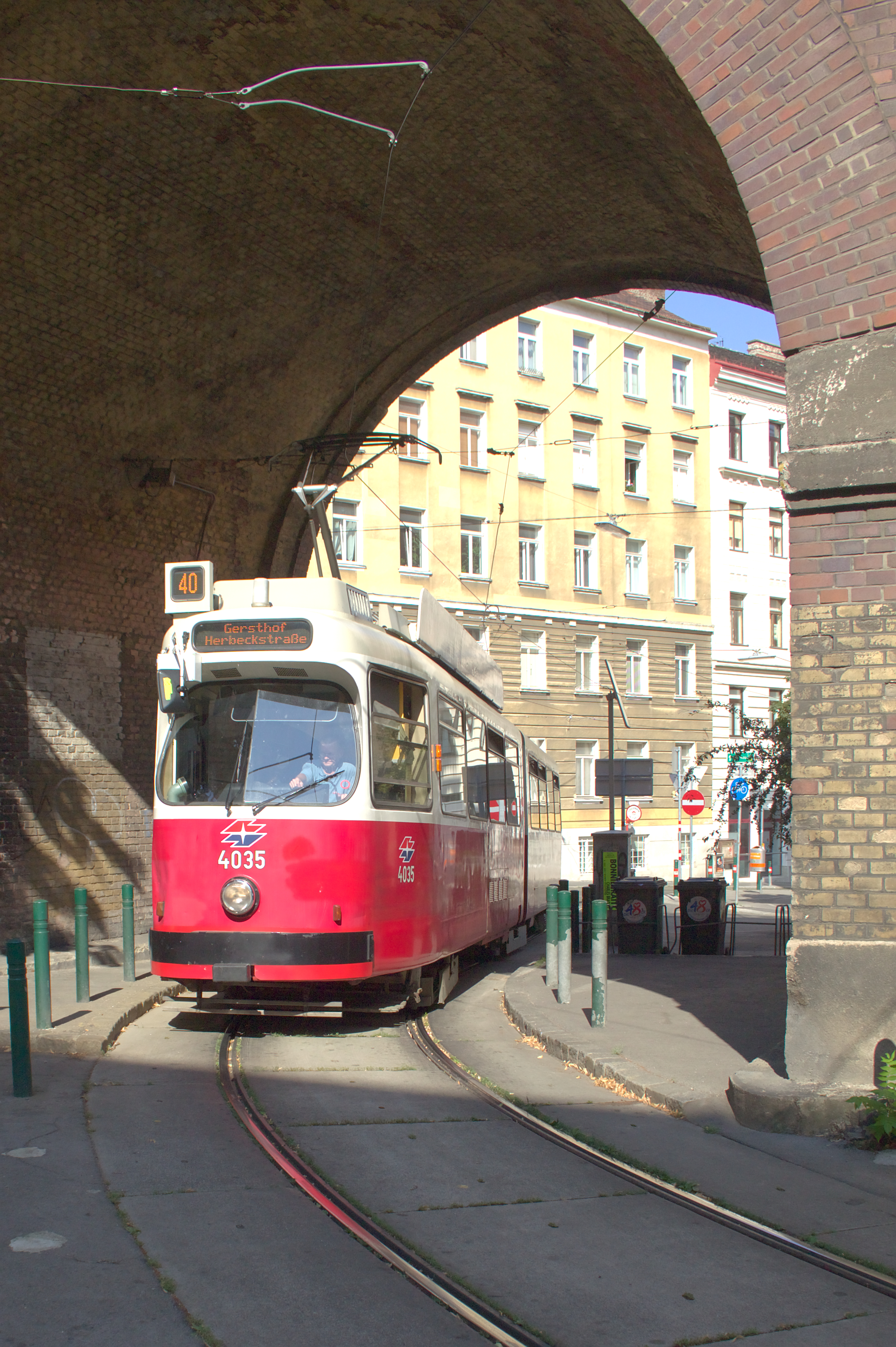 Im Sommer 2013 wurden die Wiener Straßenbahnlinien durch die Währinger Straße wegen Gleisbauarbeiten umgeleitet: die Linie 37 fuhr Hohe Warte - Antonigasse, die Linie 38 fuhr Grinzing - Währinger Straße/Spitalgasse - Zimmermannplatz, die Linie 40 fuhr Herbeckstraße - Liechtenwerder Platz, und die Linie 41 fuhr Pötzleinsdorf - Liechtenwerder Platz - Augasse; die Linie 42 war eingestellt.